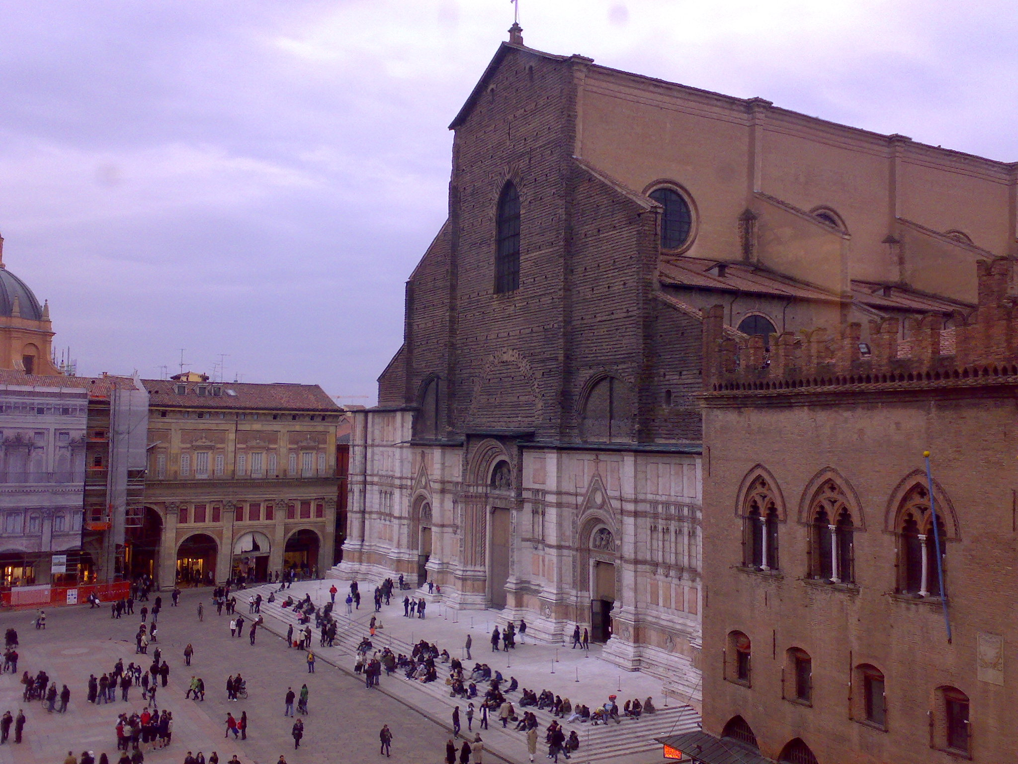 Basilica di San Petronio vista da Palazzo D'Accursio